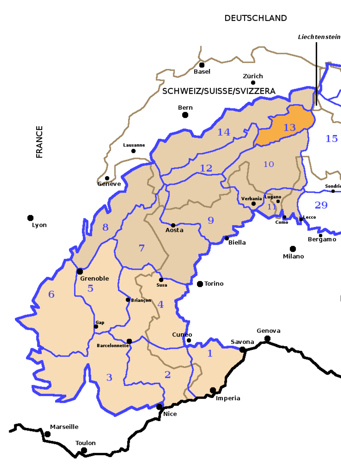 Alpi Occidentali secondo la SOIUSA con evidenziate le Alpi Glaronesi